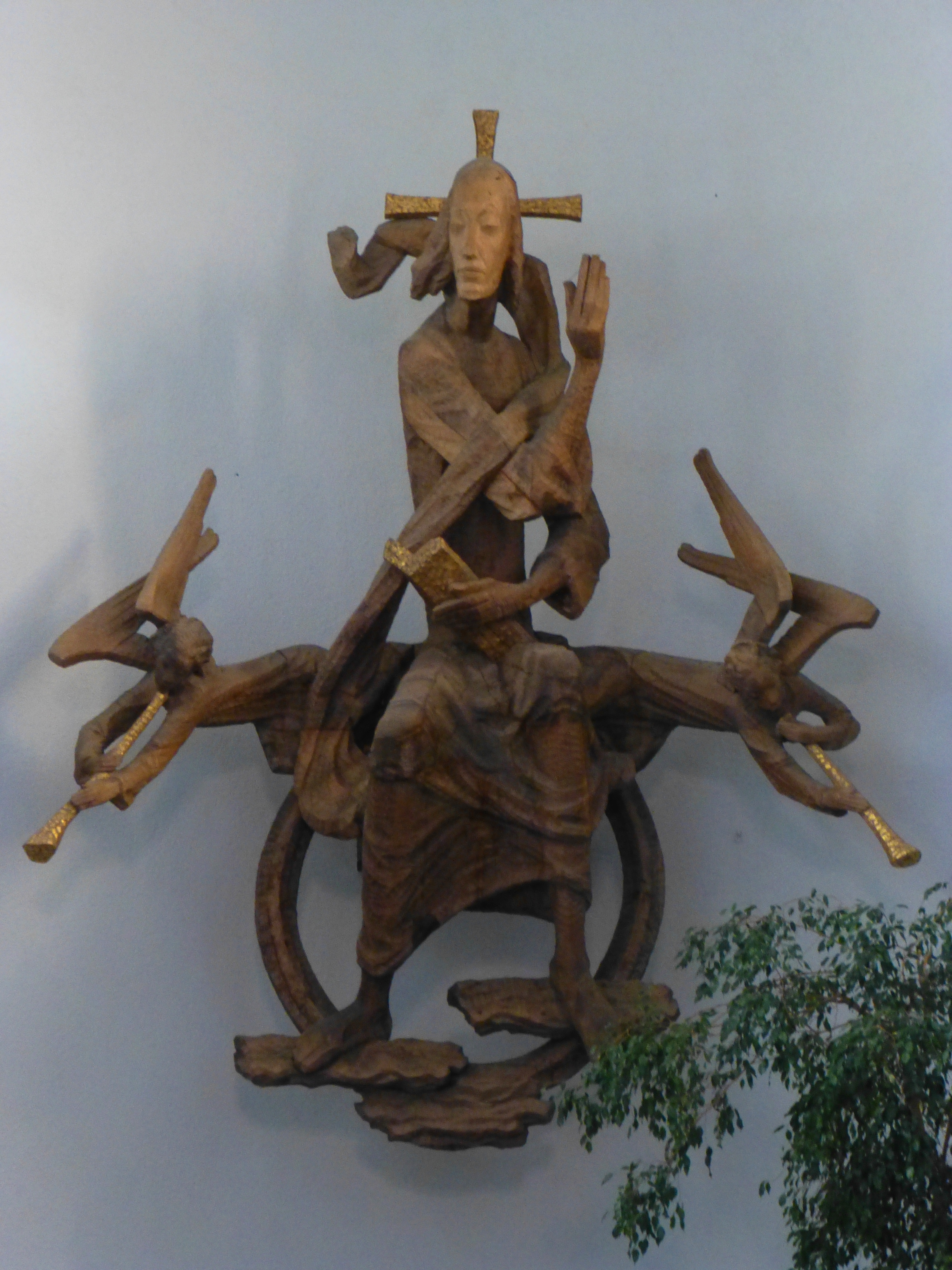 Christusfigur in der Apsis der Pfarrkirche St. Peter und Paul in Lustenau, geschaffen von Franz Staud, vollendet von Josef Staud, 1959